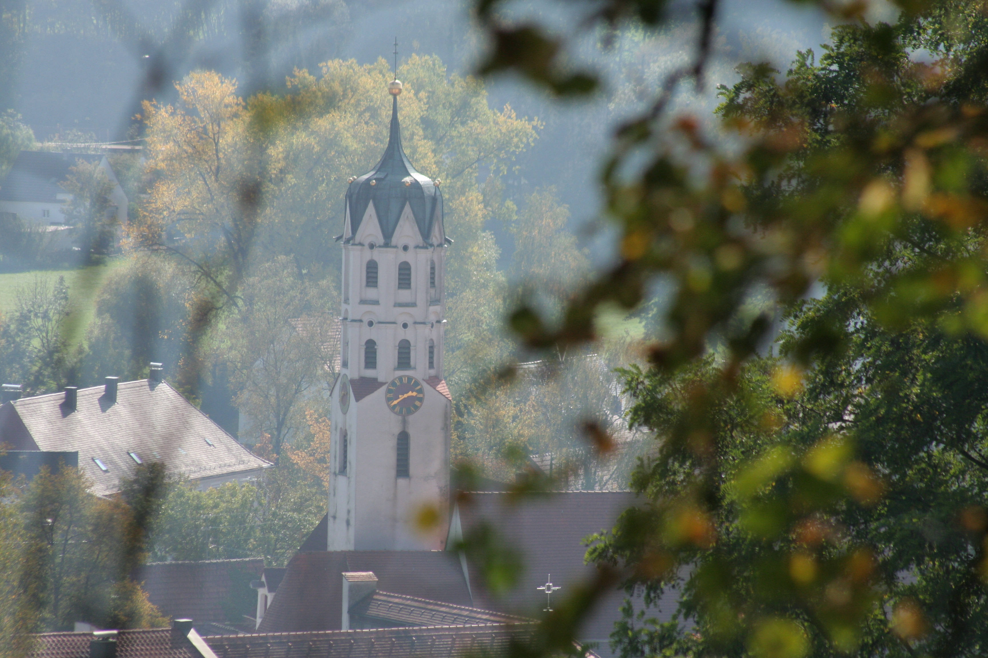 Kirchturm der St.-Anna-Kirche in Dinkelscherben